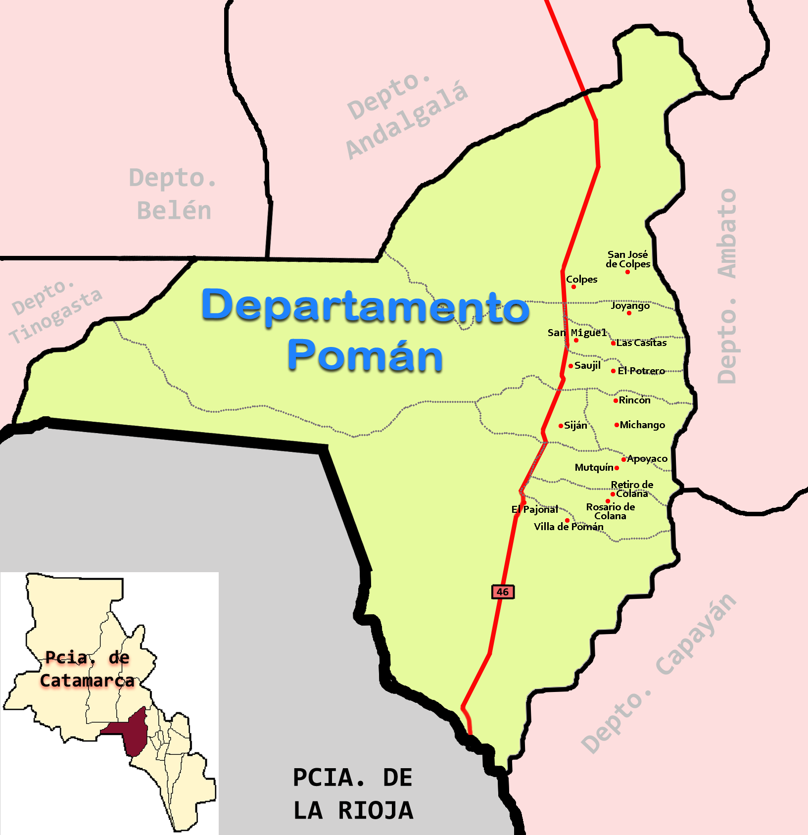 Departamento Pomán (Pcia. de Catamarca - Argentina) División política y sus poblaciones.